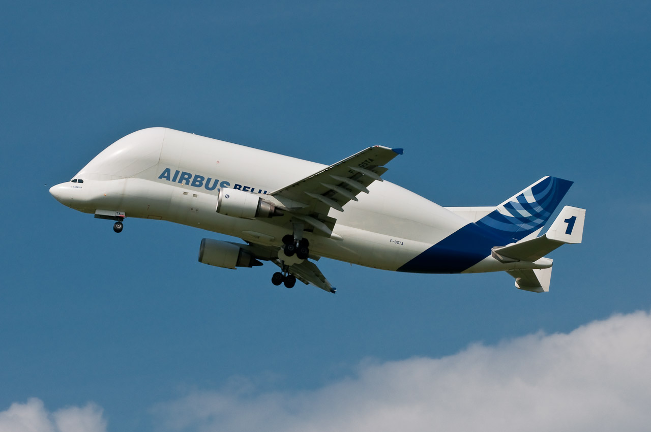 Airbus Beluga 1 F-GSTA